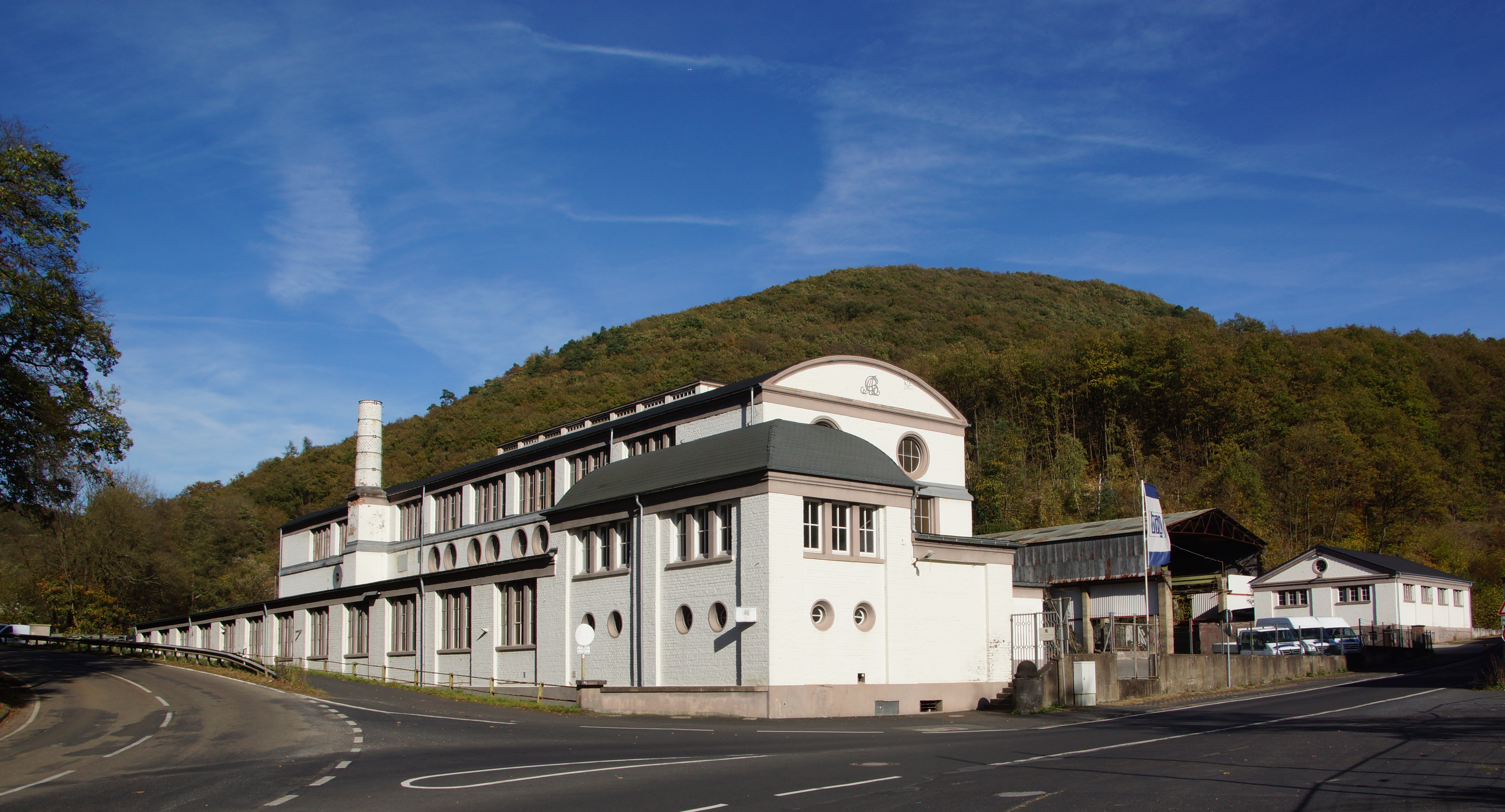 Sterner Hütte, Industriegebäude, Reparaturwerkstatt der Basalt-Actien-Gesellschaft